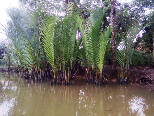 খালের পাড়ে একটি গোলবহরের দৃশ্য, খুলনা, বাংলাদেশ। গোলপাতা সুন্দরবনের একটি উল্লেখযোগ্য গাছ যার ডাল প্রধানত ঘরের ছাউনি হিসেবে বাংলাদেশের দক্ষিণাঞ্চলে বহুলভাবে ব্যবহৃত হয়।